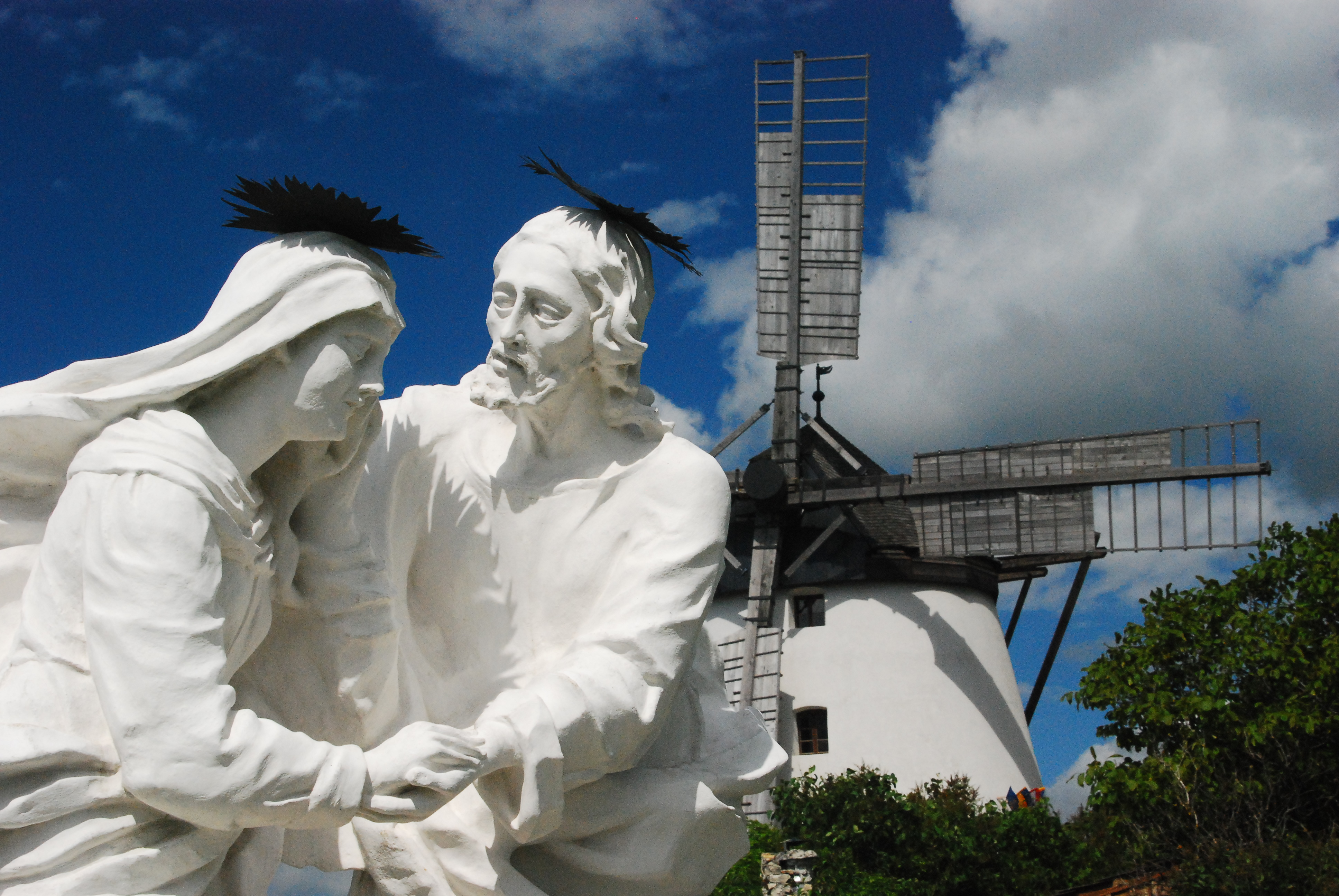 Kalvarienberg, im Hintergrund die Retzer Windmühle